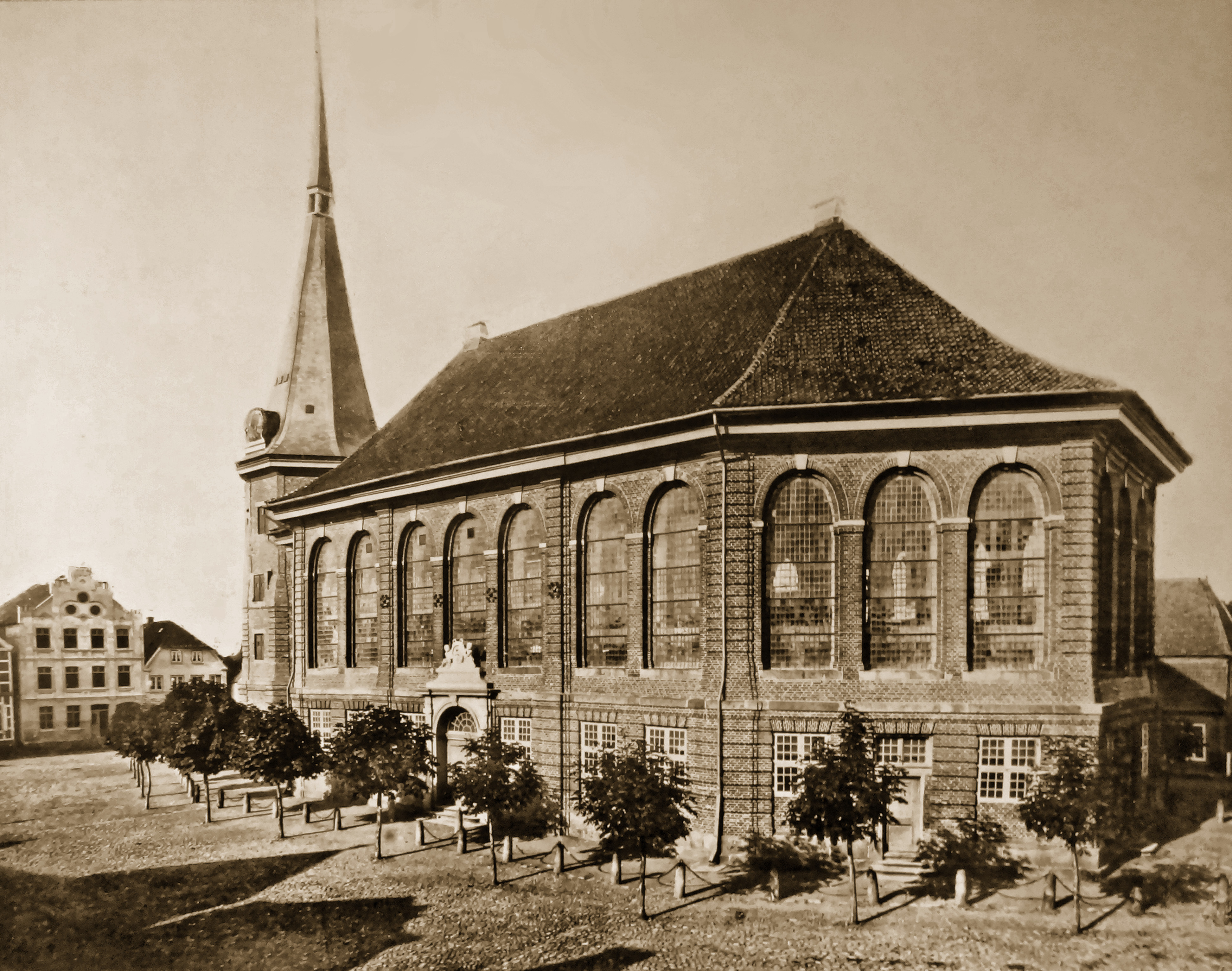 Kirche St.-Bartholomäus-Kirche (Wilster)